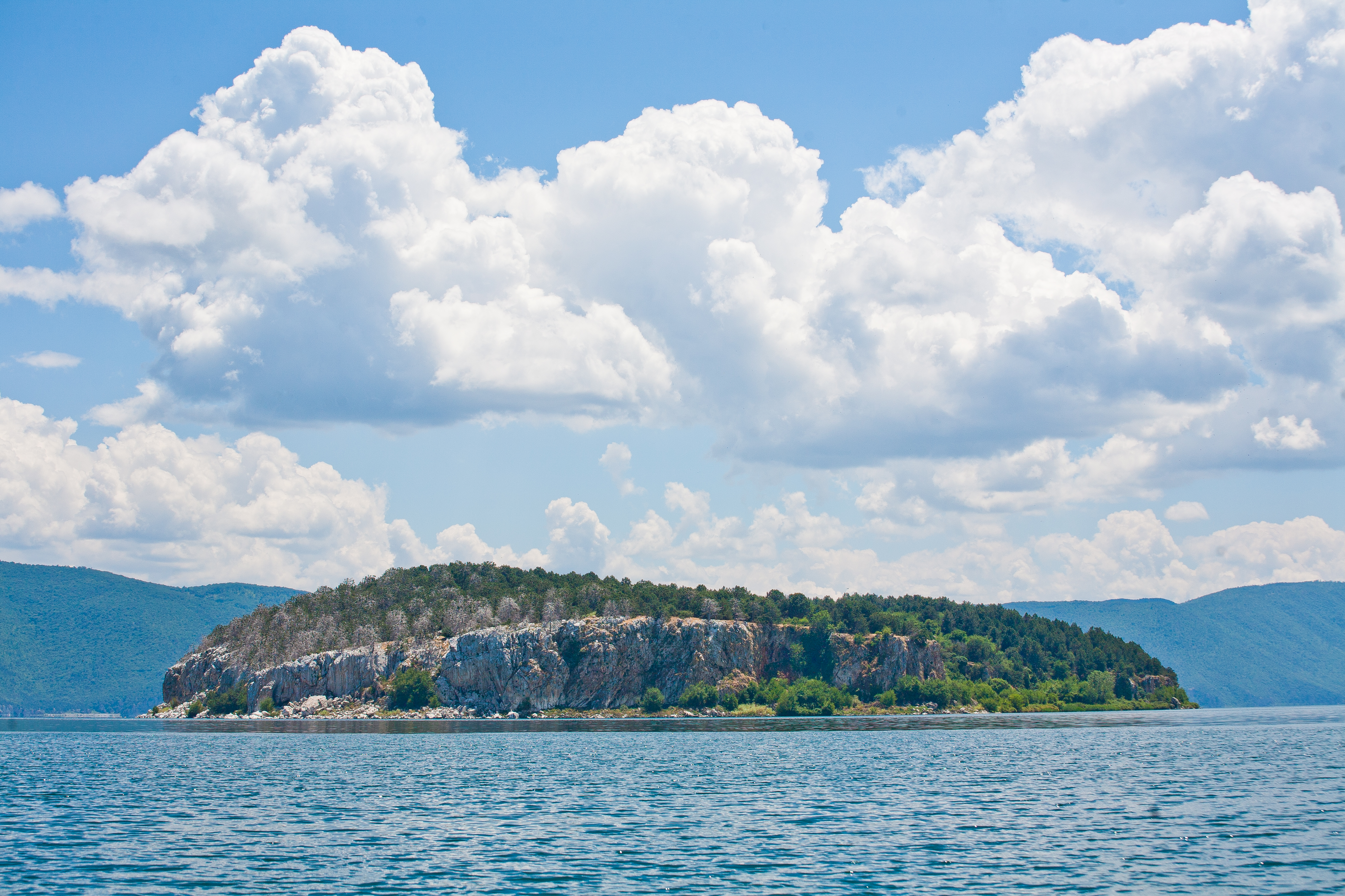 Ostrovot Golem Grad, Prespa